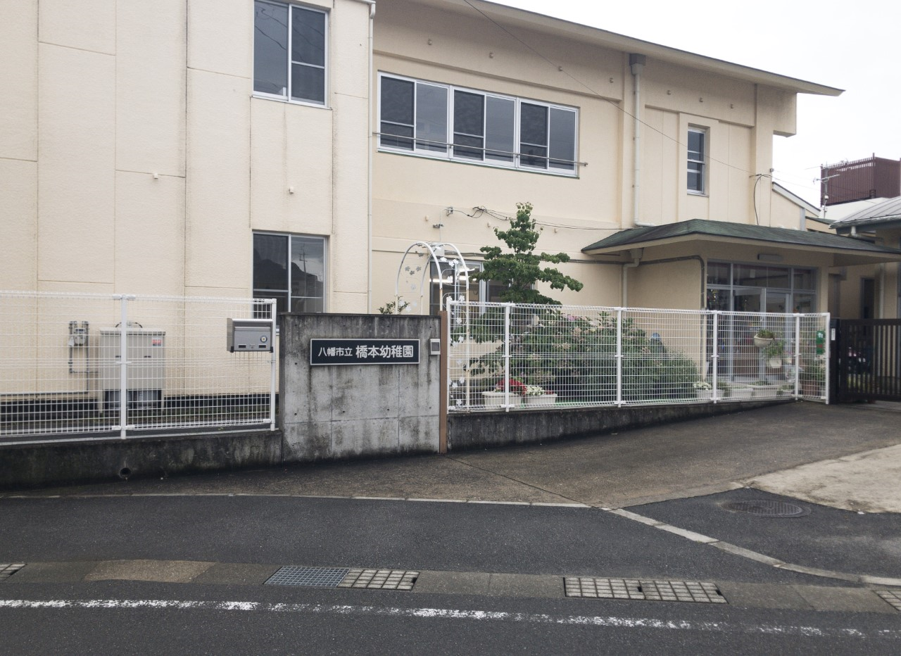 八幡市立橋本幼稚園